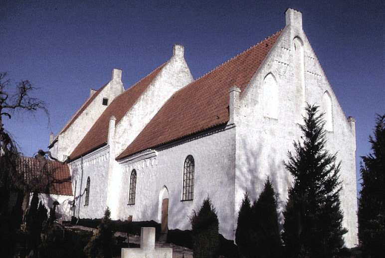 Torkildstrup Kirke i Danmark. Torkildstrup kirke